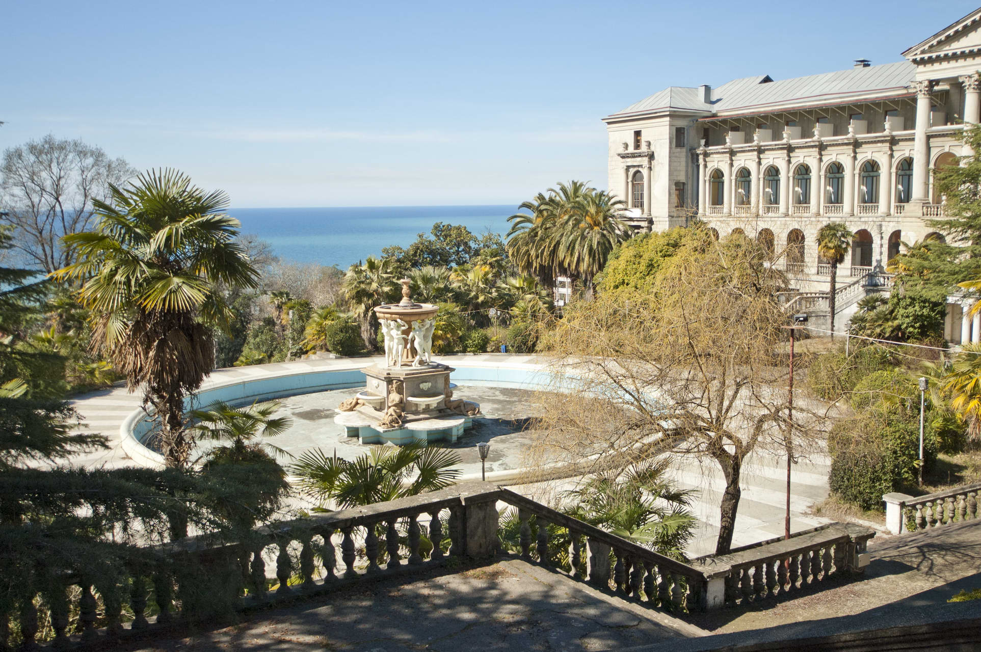 Здание санатория «Орджоникидзе» (Краснодарский край, Сочи, курортный пр.)